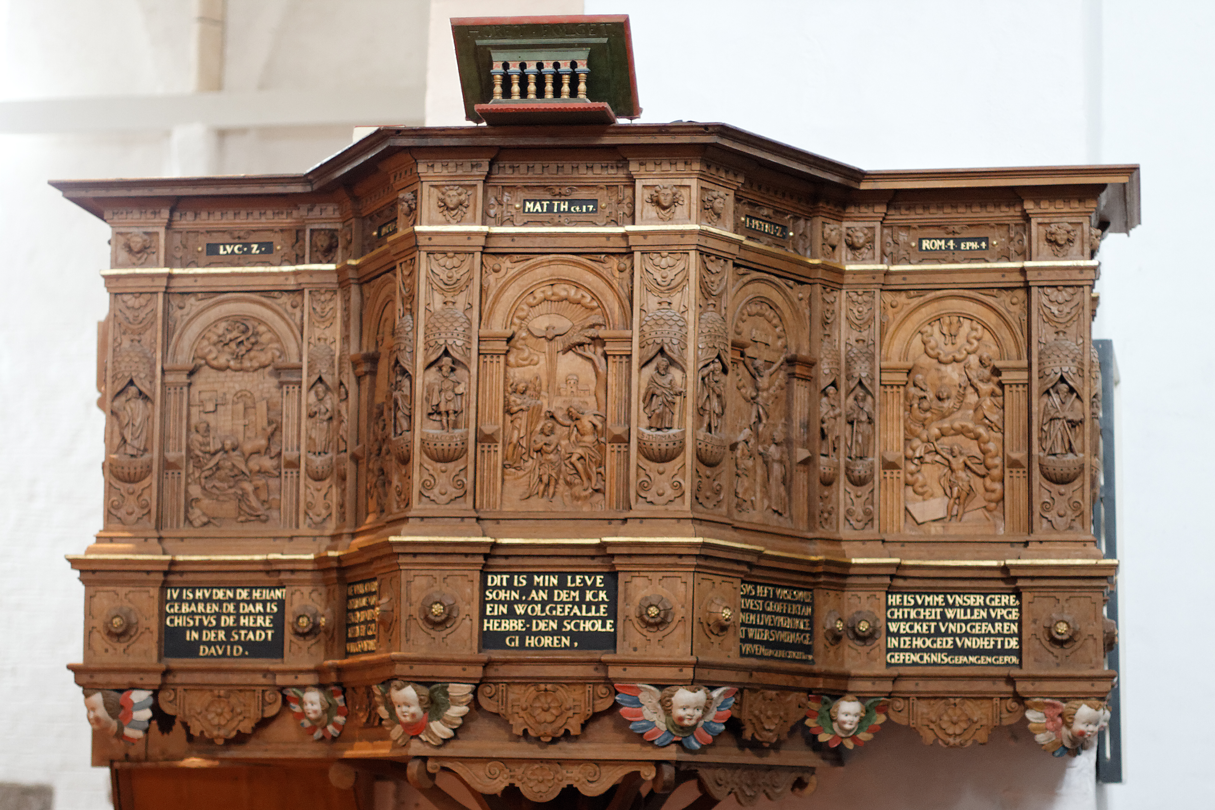 Kirche St. Johannis in Nieblum, Insel Föhr: Kanzel aus dem Jahr 1618, Vorderseite.